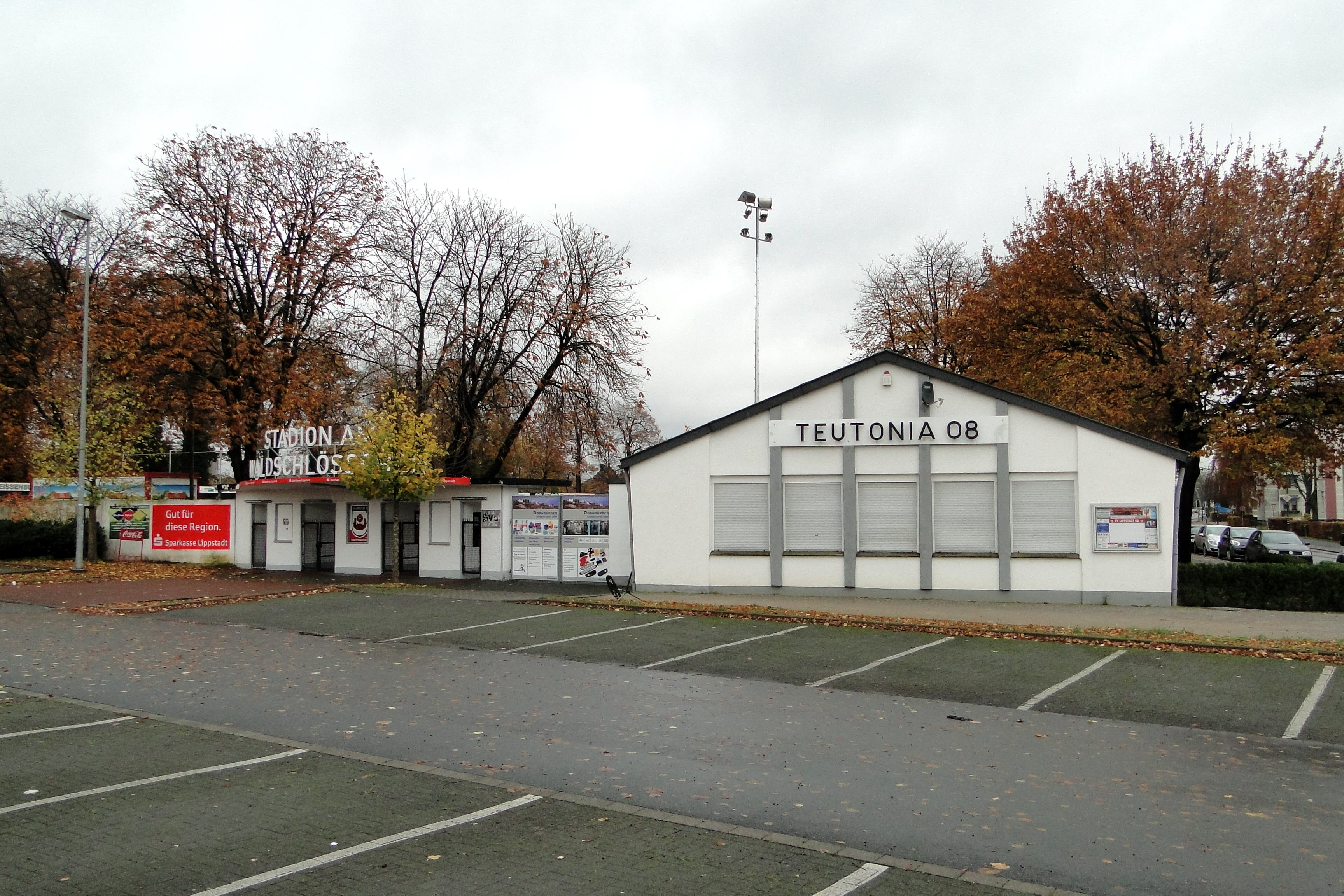 Teutonia 08